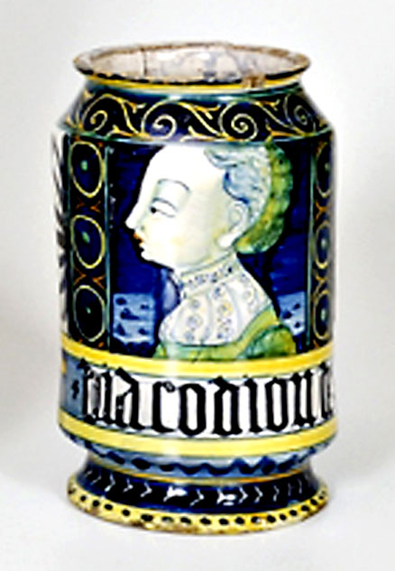 Albarello del corredo Orsini Colonna. Castelli, fornace Pompei. XVI secolo.